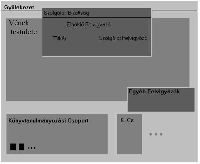 Jehova tanúi gyülekezetének hierarchiája